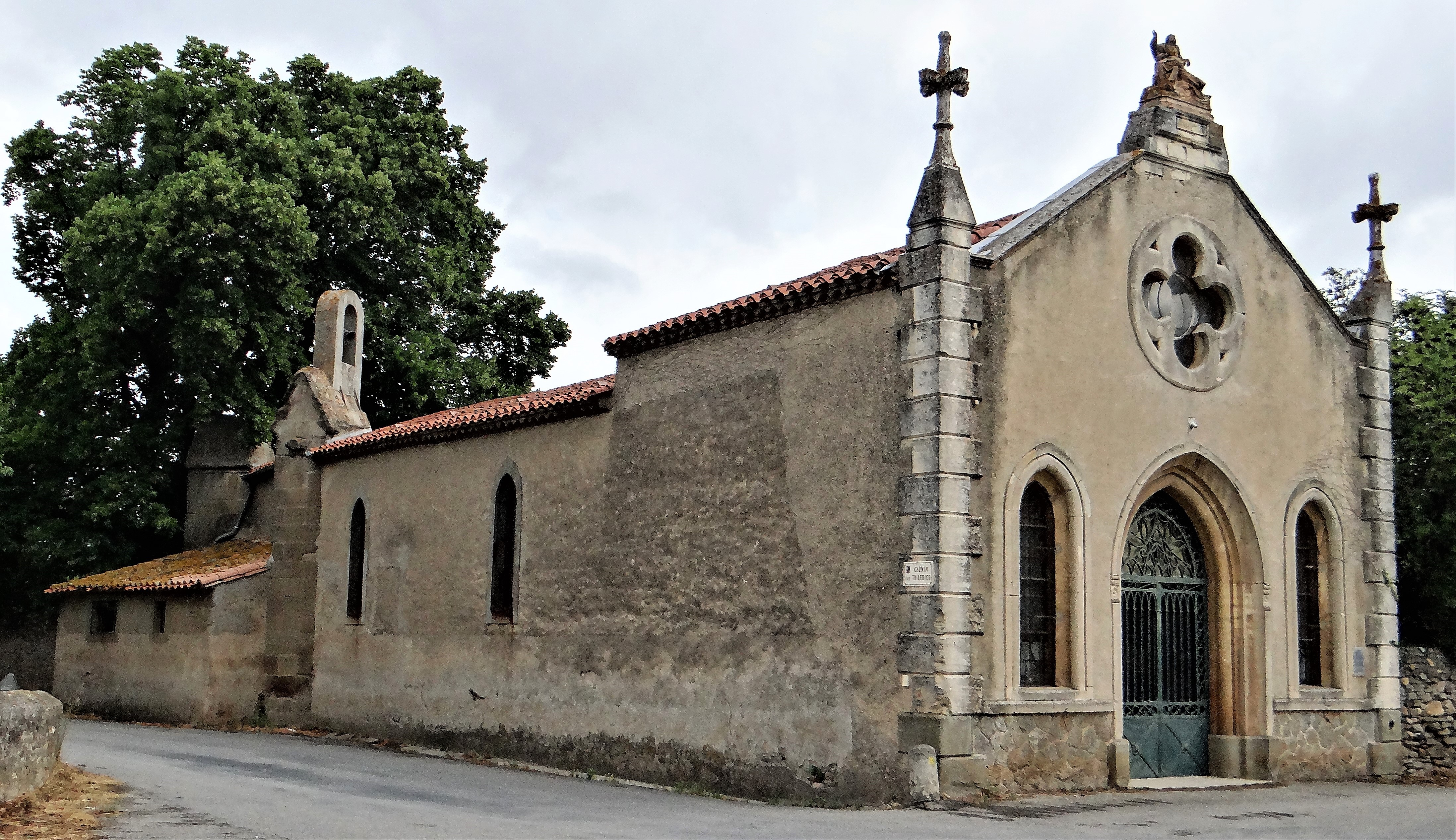 Rieux-Minervois - Chapelle Notre-Dame-du-Bout-du-Pont